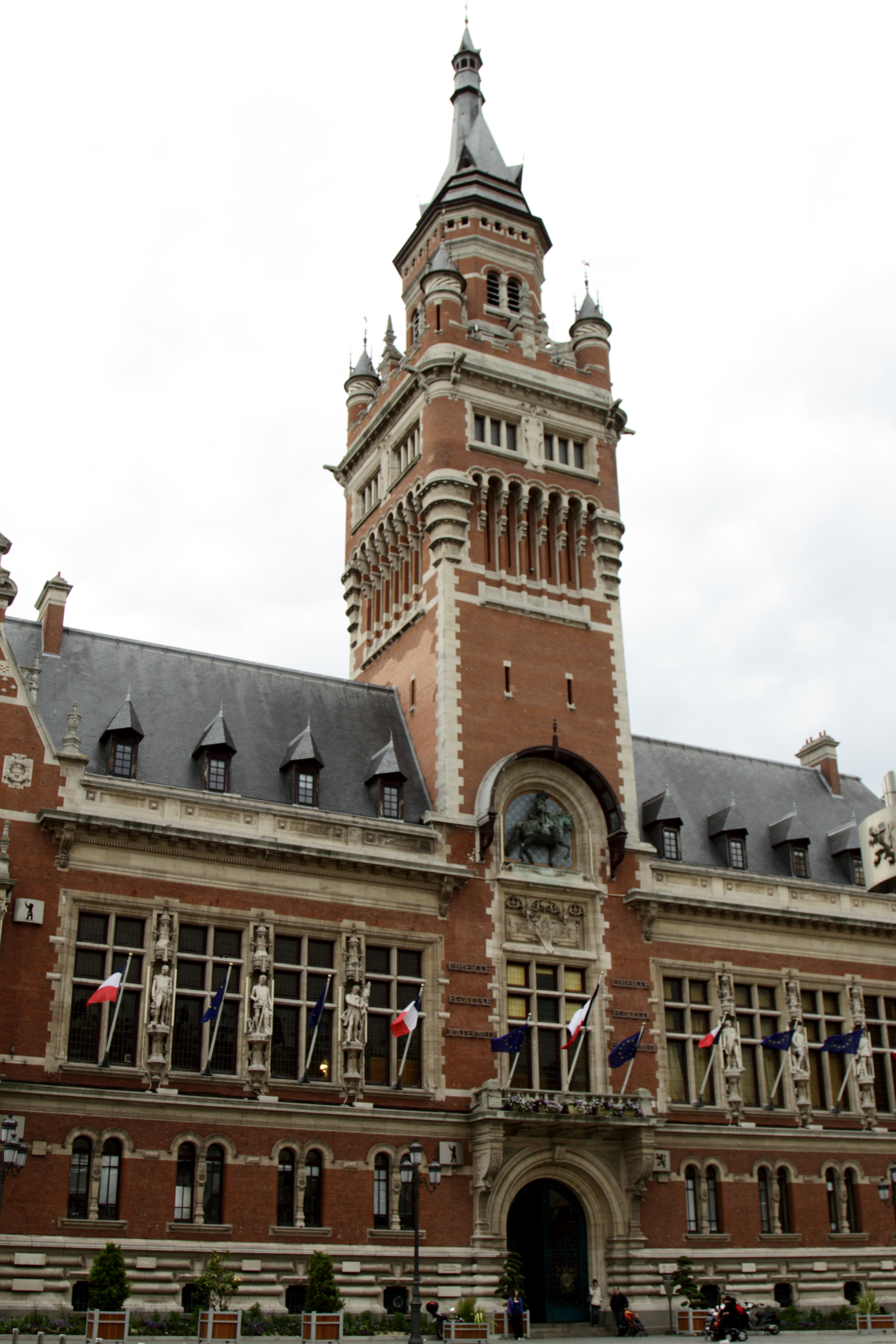 L'Hôtel de Ville (début du xxe siècle) classé au patrimoine mondial de l'Unesco, réalisé par Louis-Marie Cordonnier. Le vitrail en haut de la première volée de marches intérieure représente Jean Bart parmi son équipage sur le port au retour de la Bataille du Texel94. Dans son arrière-cour réside, ignorée de la plupart des Dunkerquois, la Porte monumentale datant du xviie siècle, du même style que la Porte de la Marine (reste des fortifications de Vauban) à l'entrée d'un des pôles commerciaux (CentreMarine)